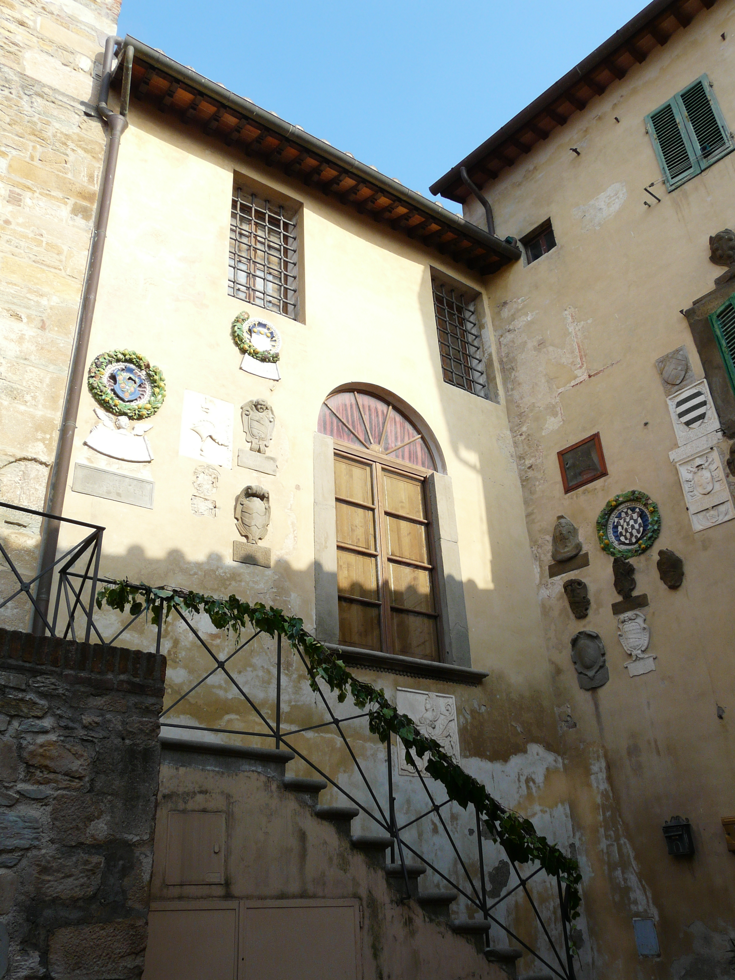 Palazzo Pretorio, Comune di Vicopisano, Toscana, Italia